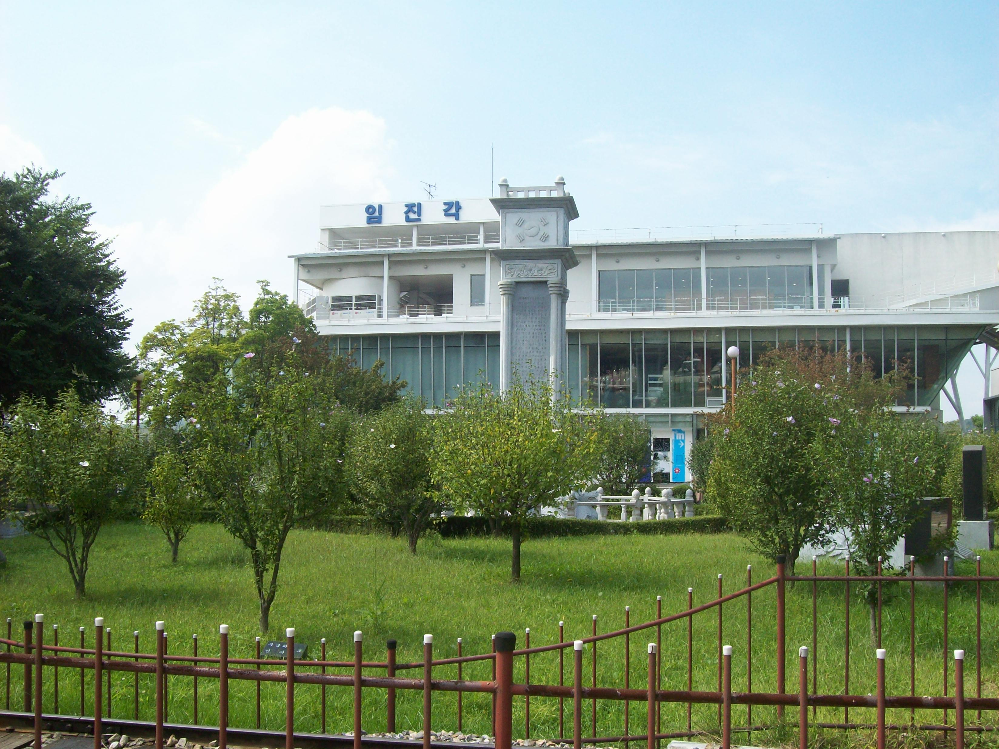 임진각 모습